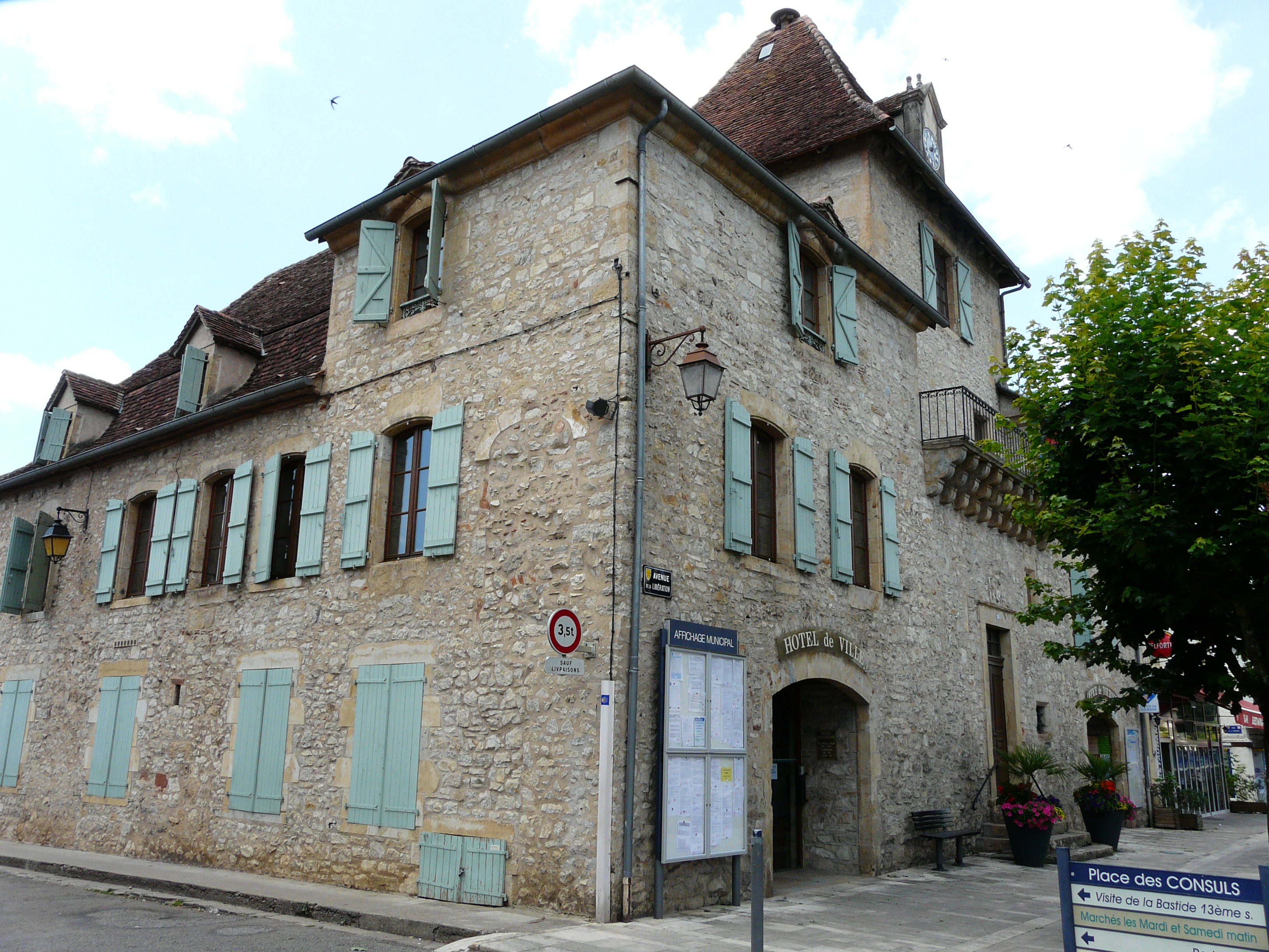 L'hôtel de ville de Bretenoux, Lot, France.